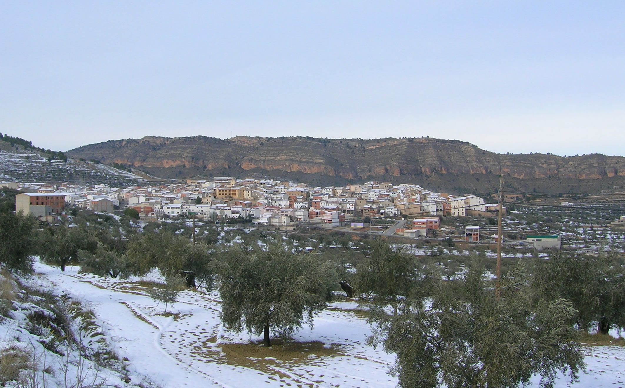 Ferez, Albacete, Spain. Férez, Albacete, España. My picture, given to PD.